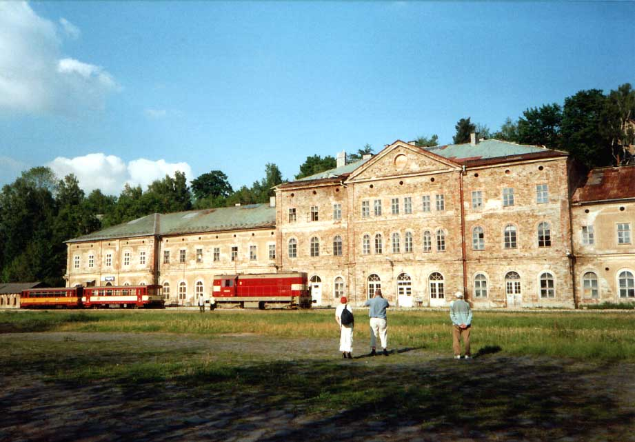 Bahnhof Weipert an der deutsch-tschechischen Grenze